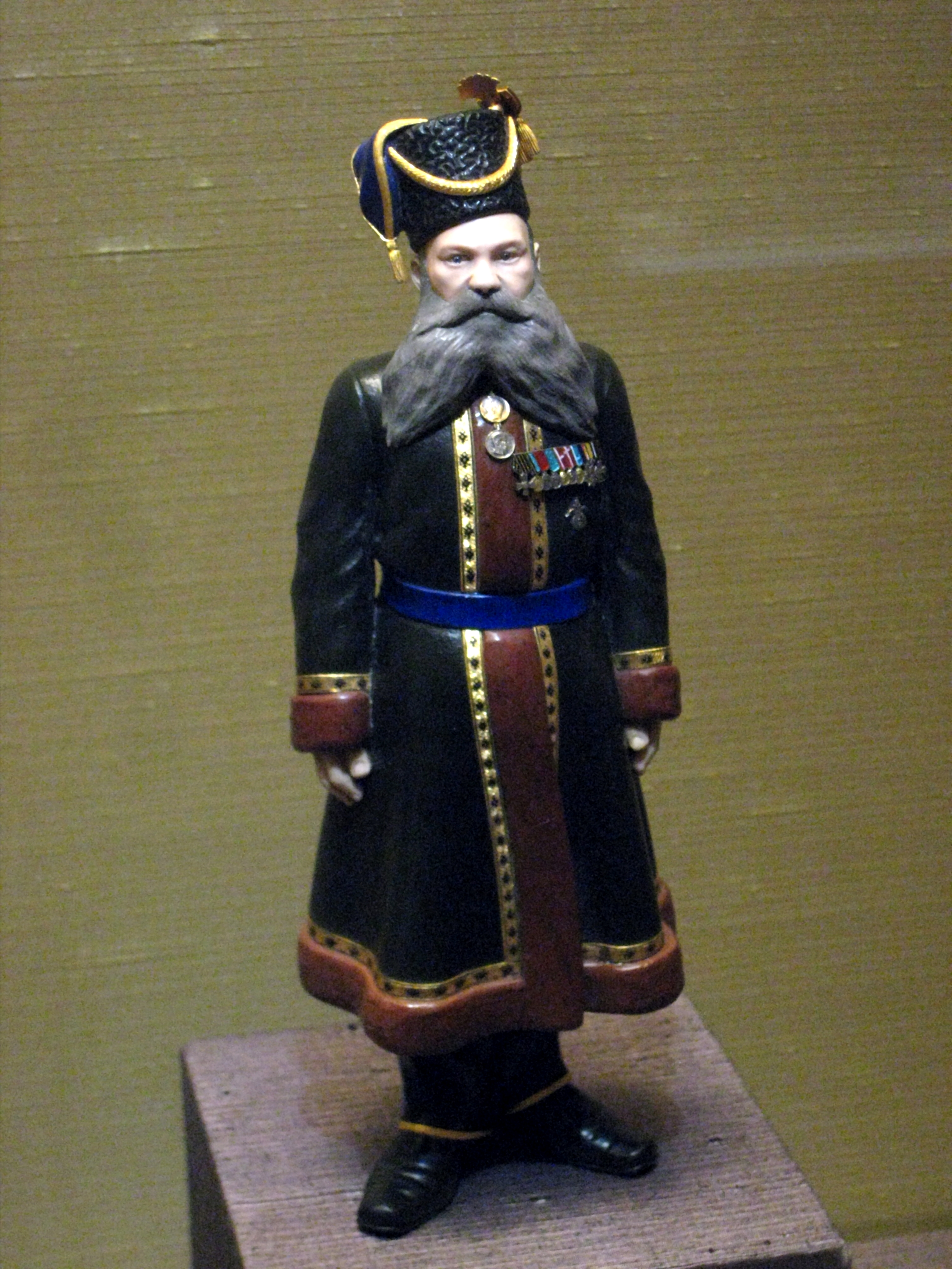 Фигурка камер-казака императрицы Марии Федоровны А.А. Кудинова. Принадлежала Николаю II. Санкт-Петербург, 1912. Фирма К. Фаберже, мастер Г. Вигстрем (?). Уральские камни, сапфиры, золото, серебро. Государственный музей-заповедник "Павловск". Камер-казак Андрей Алексеевич (1852, с. Медведицы Раздорской станицы IV военного отдела области Войска Донского - 1915). Изображен в выездной праздничной форме: в шубе из темно-зеленого нефрита с опушкой из коричневого обсидиана с гербовым басоном цвета золота. На нем пояс из лазурита, шаровары из темно-зеленого нефрита с галуном из накладного золота, кивер из черного обсидиана с шлыком из лазурита, галуном, кутасом, кистью и щитом накладного золота. Сапоги из черного обсидиана. Находилась в Парадном кабинете Николая II в Александровском дворце Царского Села.